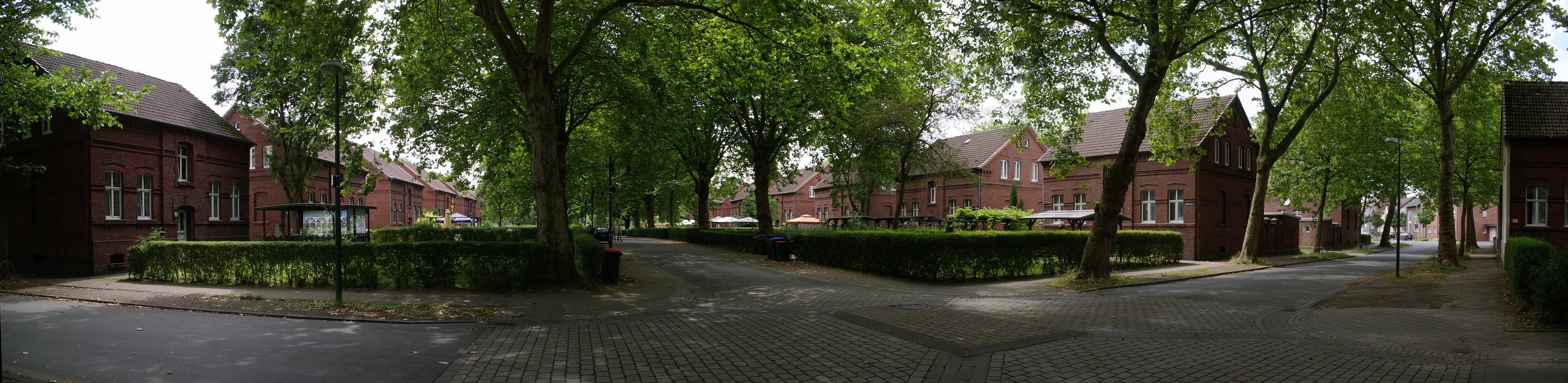 Siedlung Ziethenstraße, eine Zechensiedlung in Lünen, Nordrhein-Westfalen, am Nordrand des Ruhrgebiets. Die Siedlung ist Teil der Route der Industriekultur, Themenroute Arbeitersiedlungen.